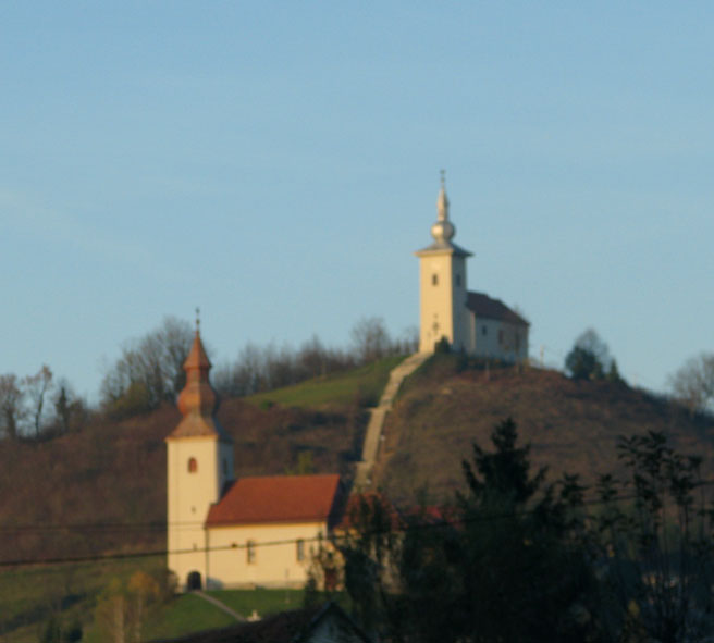 Crkva.